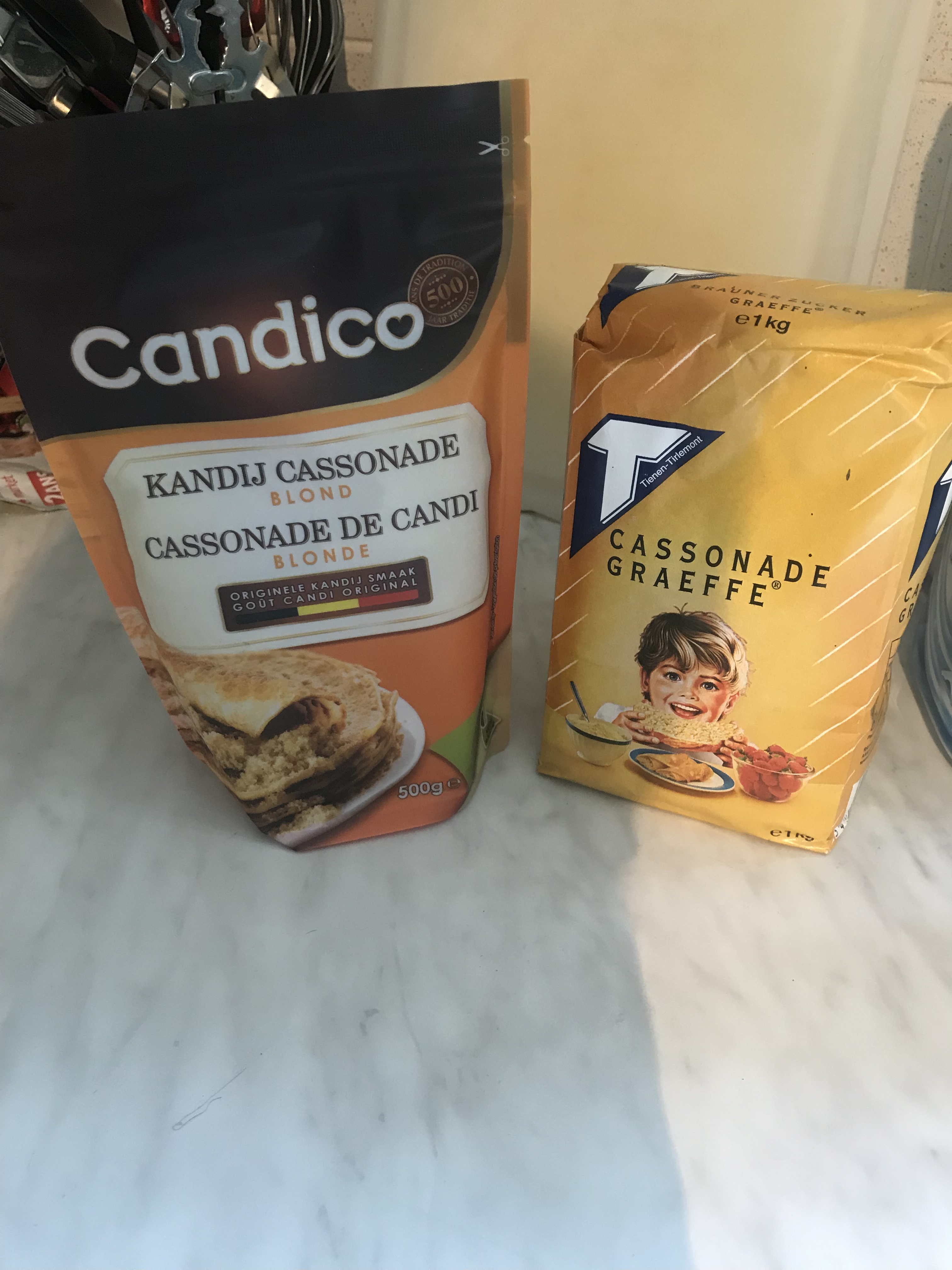 Deux cassonades blondes